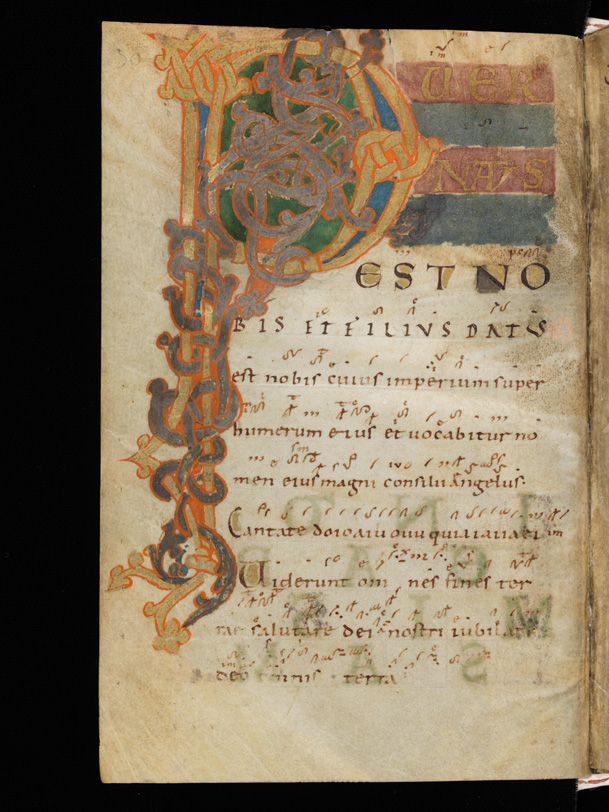 Cod. Eins. 121, Grosse Initiale P in Gold mit roter Konturierung und Rankenwerk, S. 30